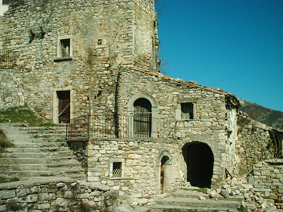 Codacchio, foto scattata da Giuliano Oreste D'Amico alias Rafaniello